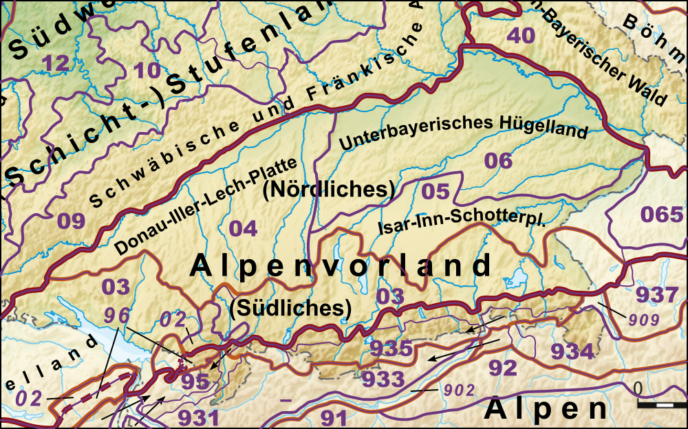 Haupteinheitengruppen von Alpenvorland und Alpen